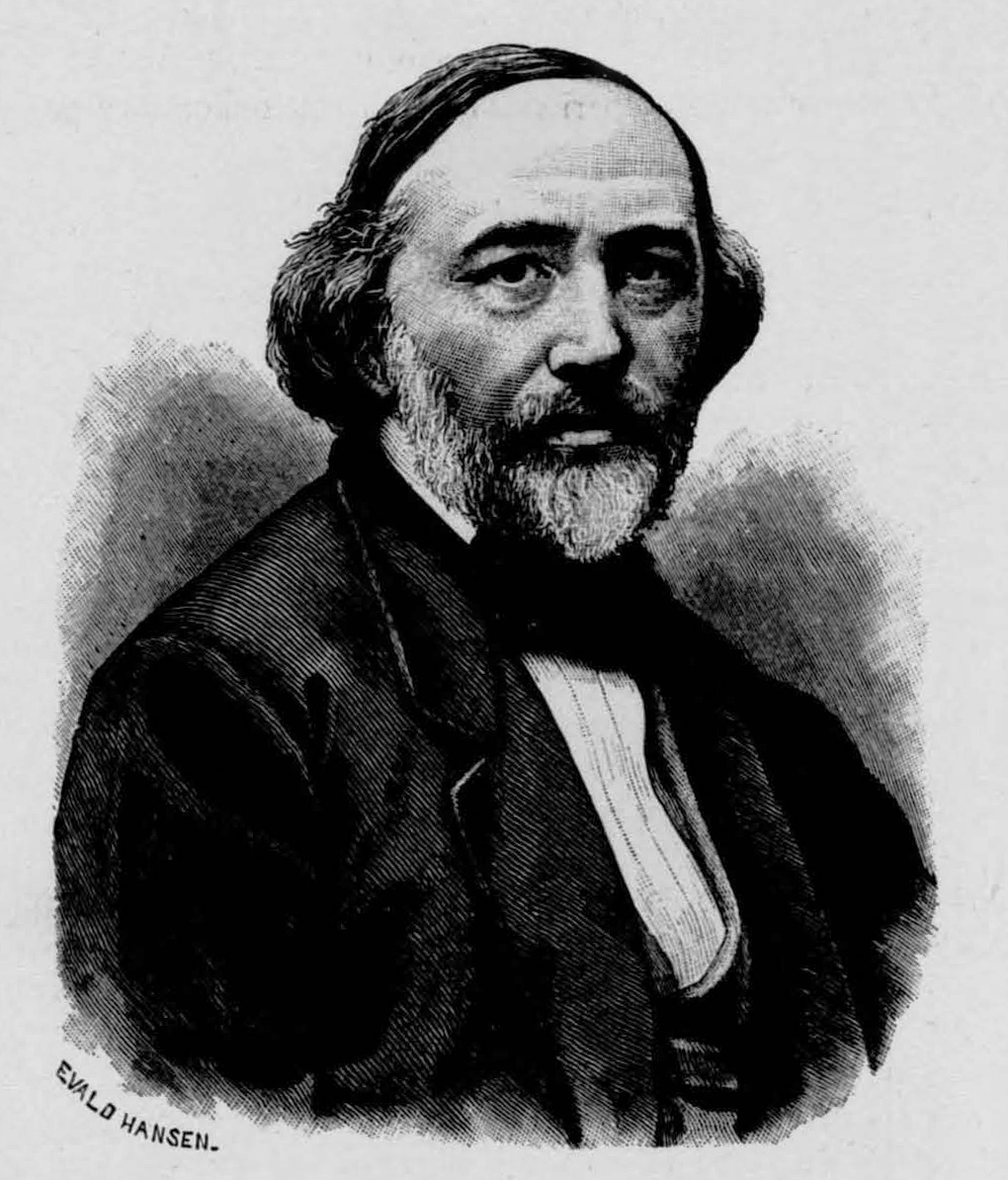 Johan Leonard Höijer (1815-1884)